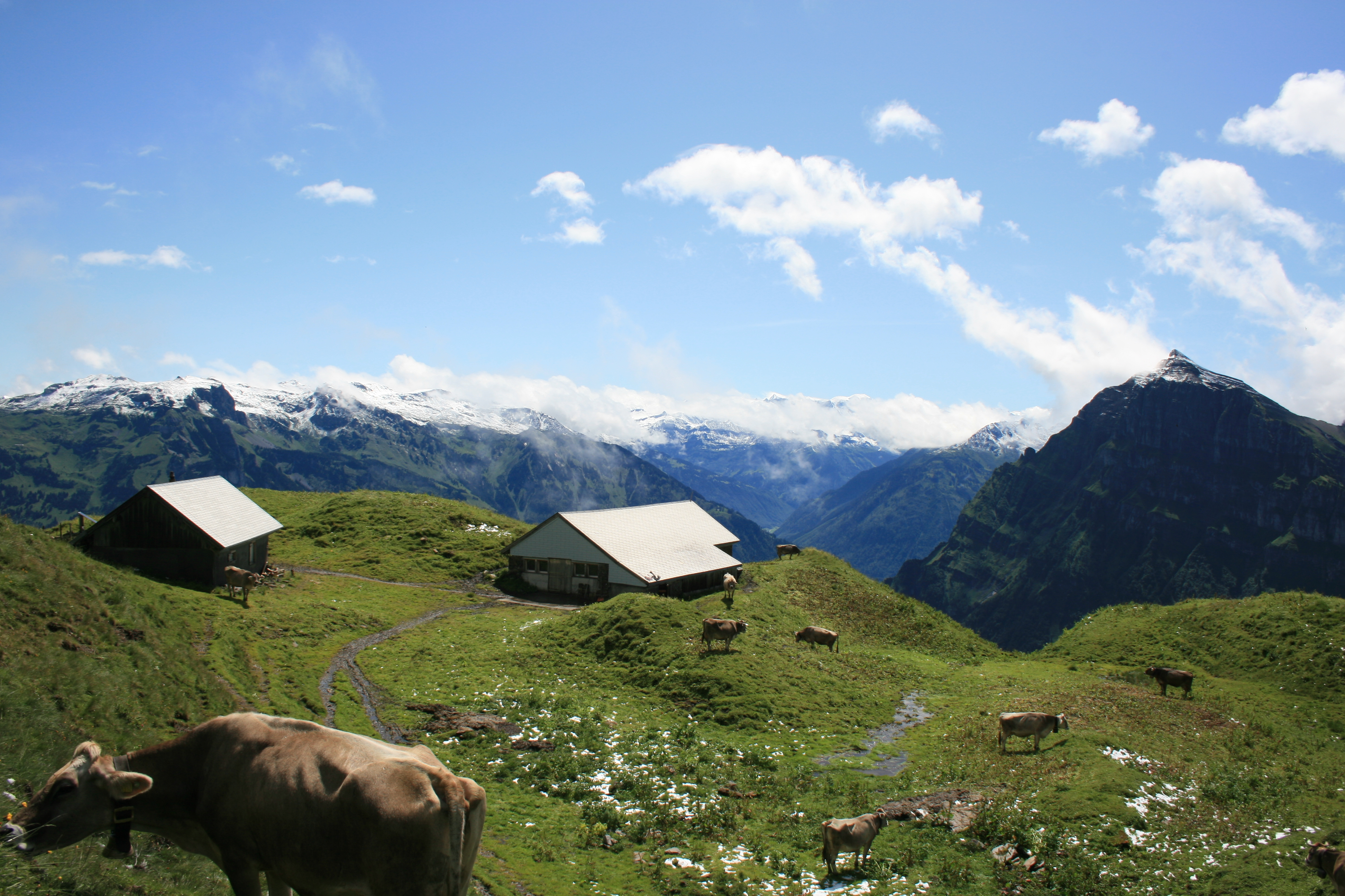 Hütte und Stallgebäude Aueren Oberstafel. (Bild: Andreas Schnyder)